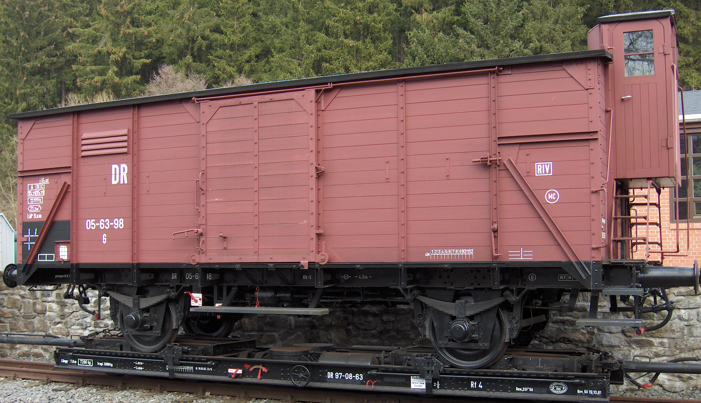 Gebremster G-Wagen der Verbandsbauart A2, hier ein durch die Deutsche Reichsbahn umgebautes Exemplar mit Aussteifungen in den äußeren Seitenfeldern und rollengelagerten Umbauradsätzen.